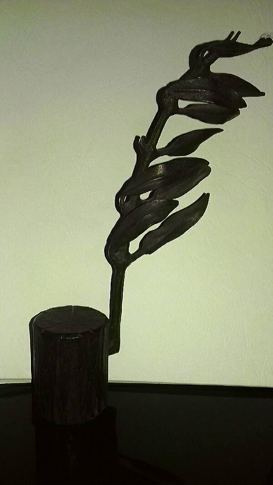 Opera in stile liberty di Gino Manara realizzata nel secondo dopoguerra, altezza circa 30 cm.